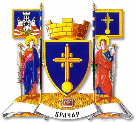 Das Wappen der Stadt und Gemeinde Vračar